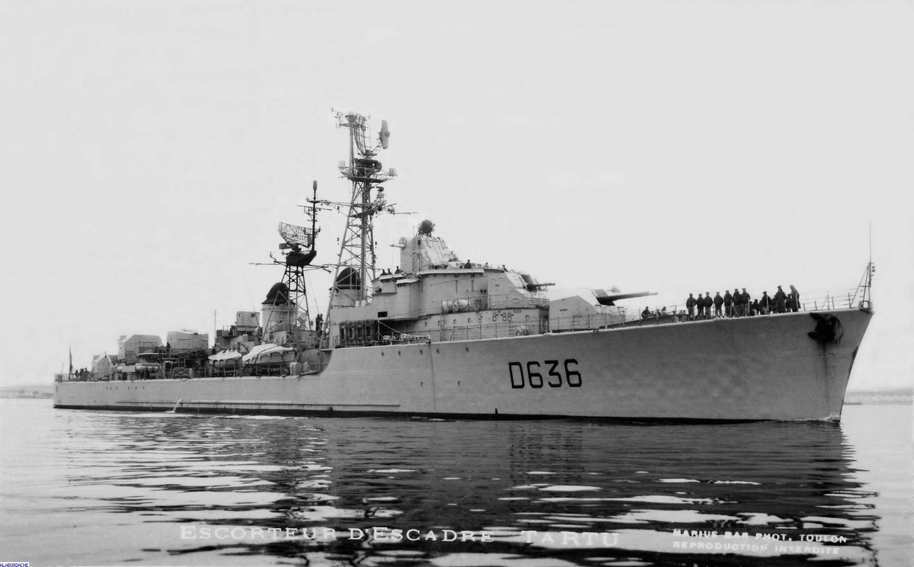 Tartu (D636), escorteur d'escadre de classe T 53 de la Marine nationale française.